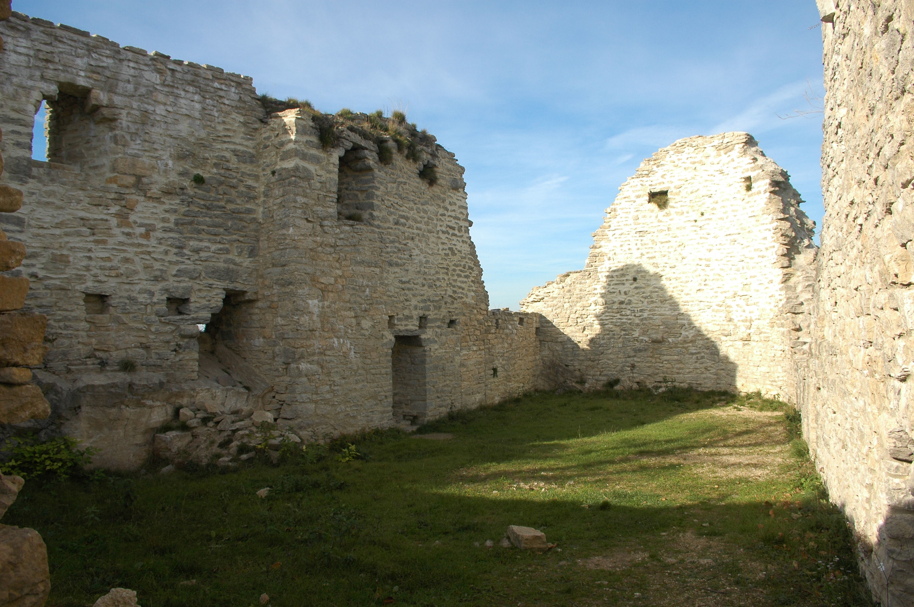 Donjon du château d'Oliferne